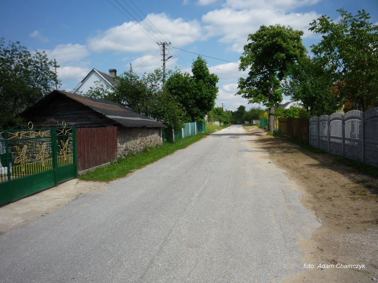 pytalem, ale nikt nie wiedział dlaczego Paruchy ?